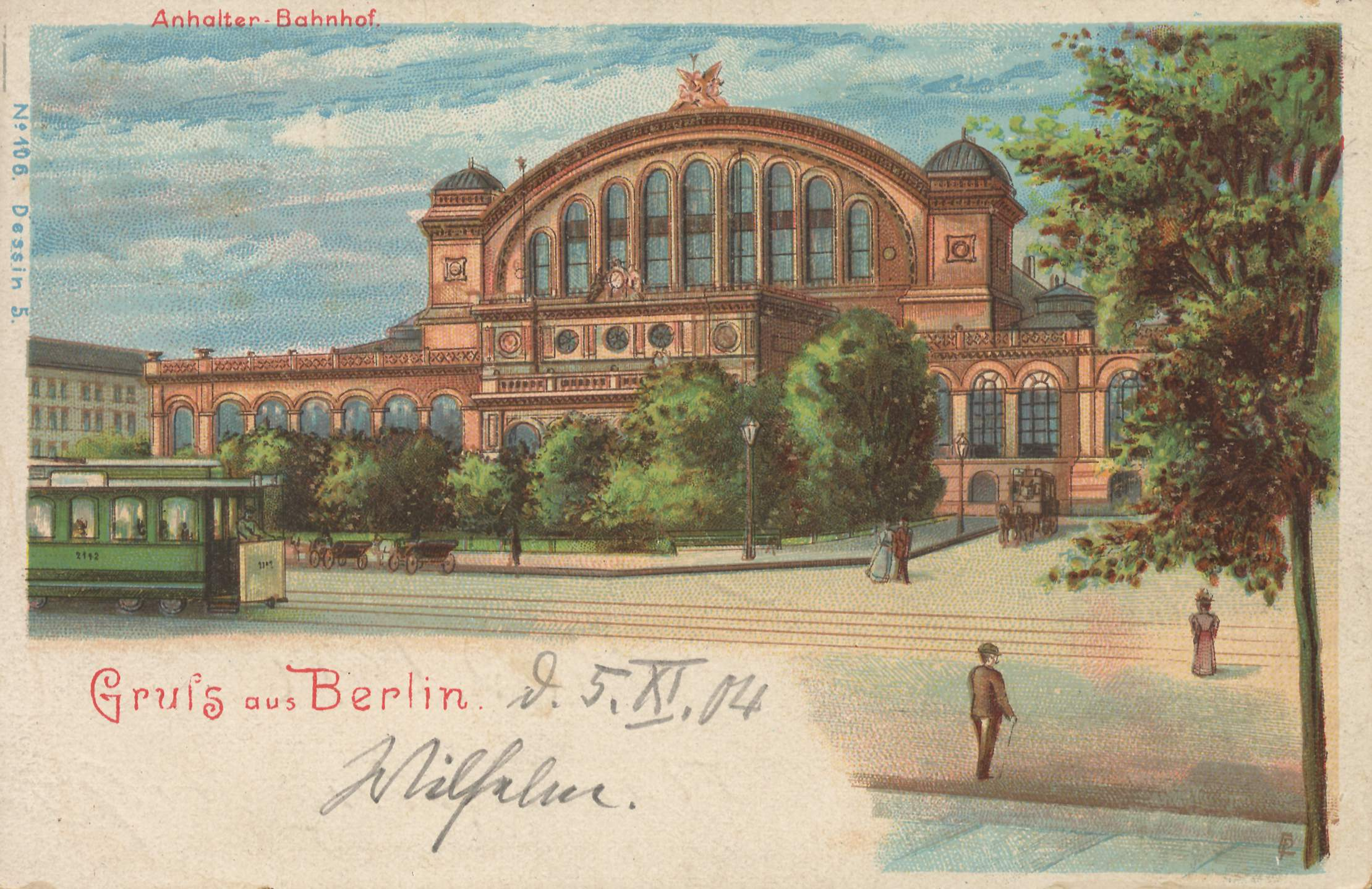 Anhalter Bahnhof in Berlin-Kreuzberg